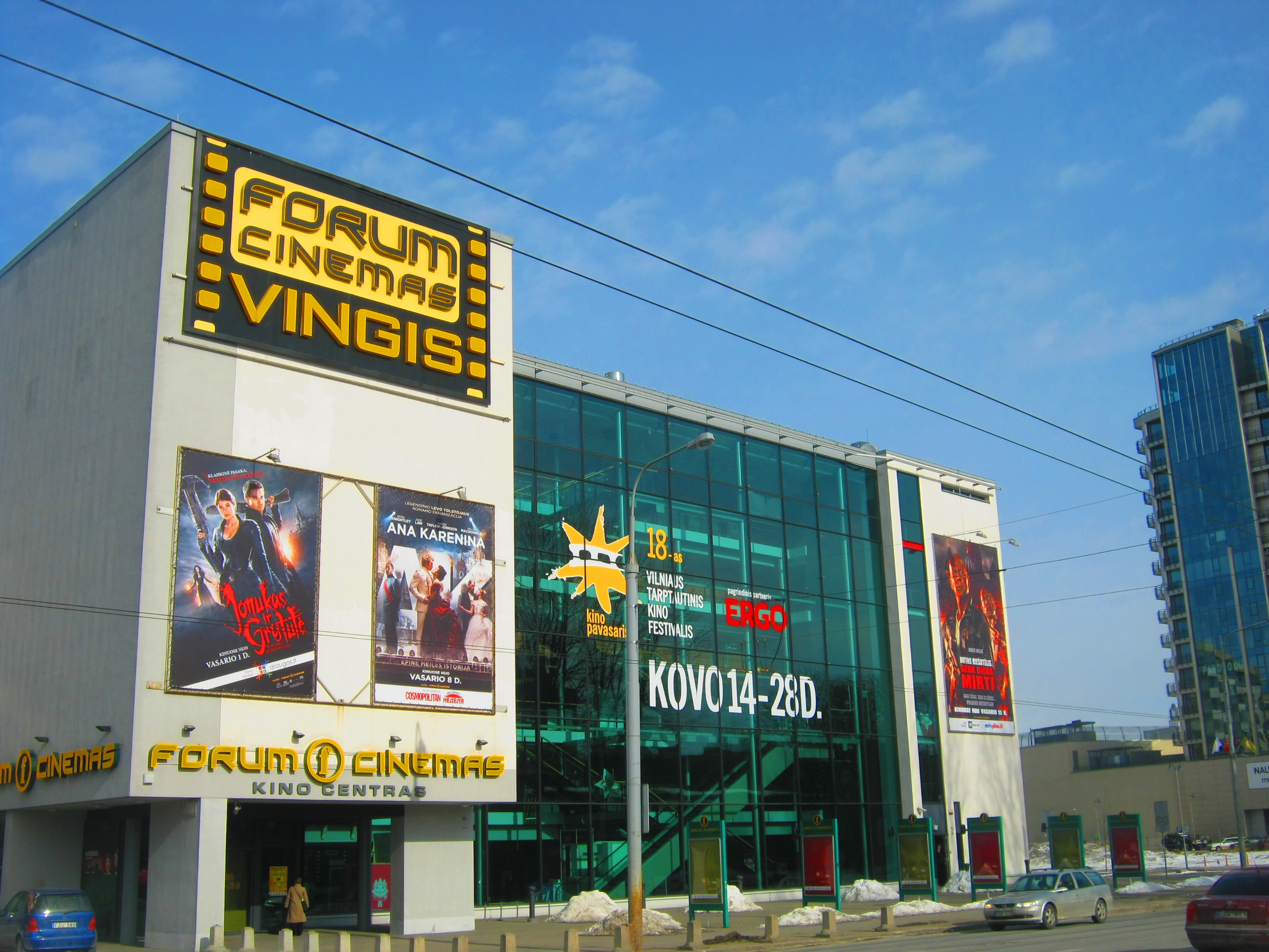 Vilnius